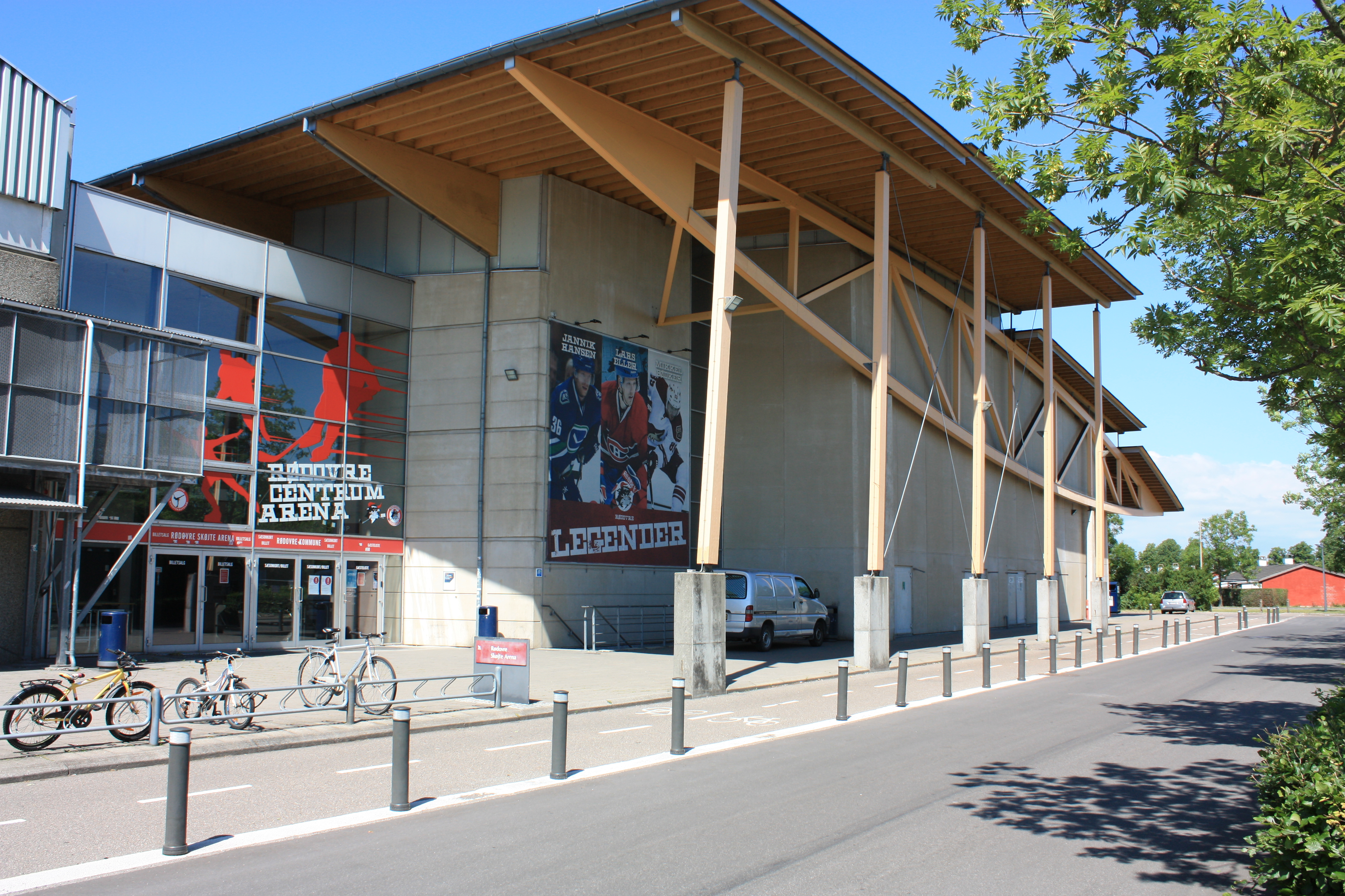 Hovedindgangen til Rødovre Skøjte Arena, hjemmebane for ishockeyholdet Rødovre Mighty Bulls